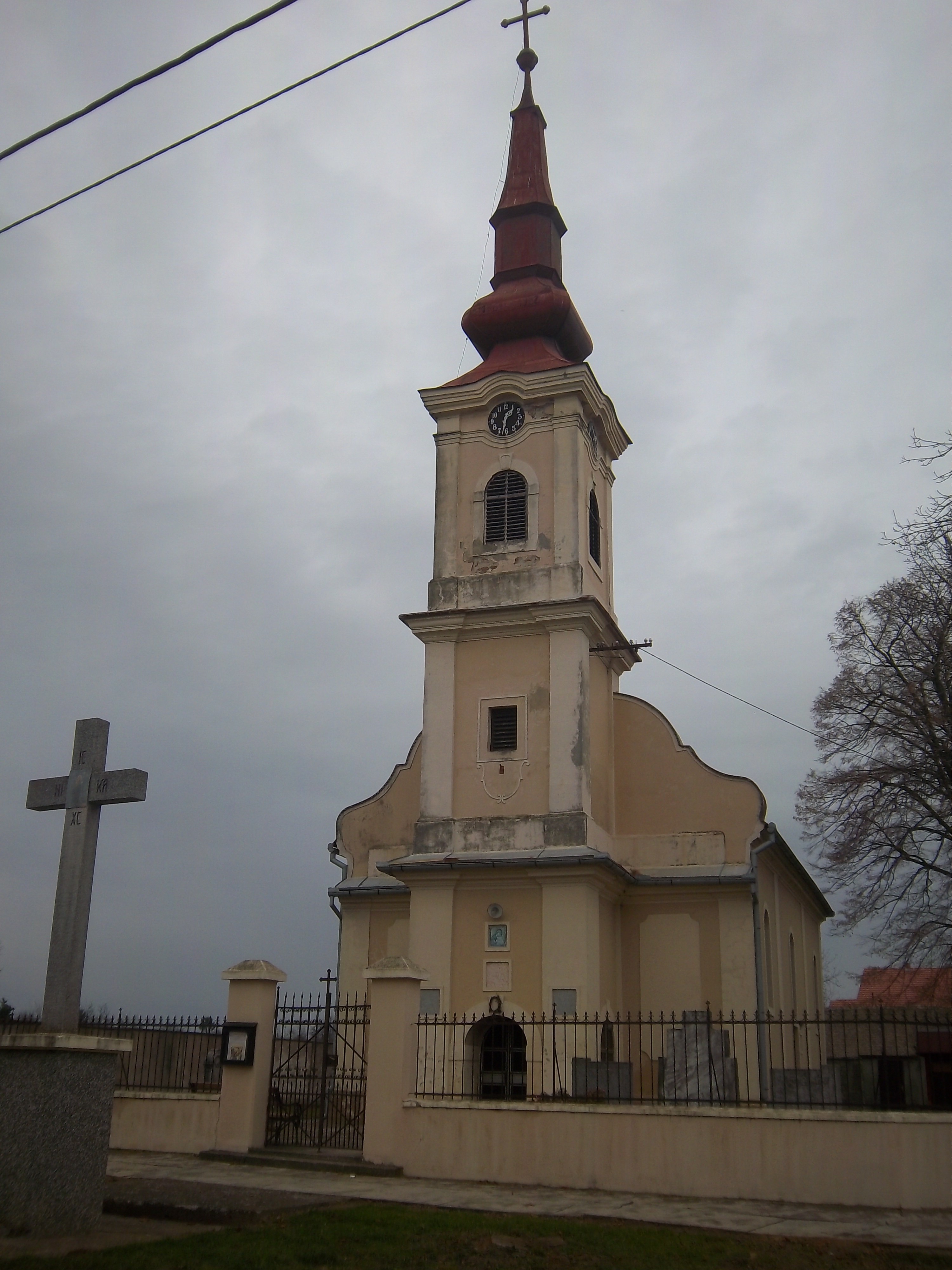 Pravoslavna crkva u Negoslavcima.